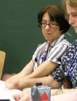 Ursula Wolf